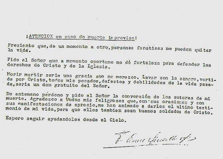 Testamento Espiritual de Fray Cosme Spessotto